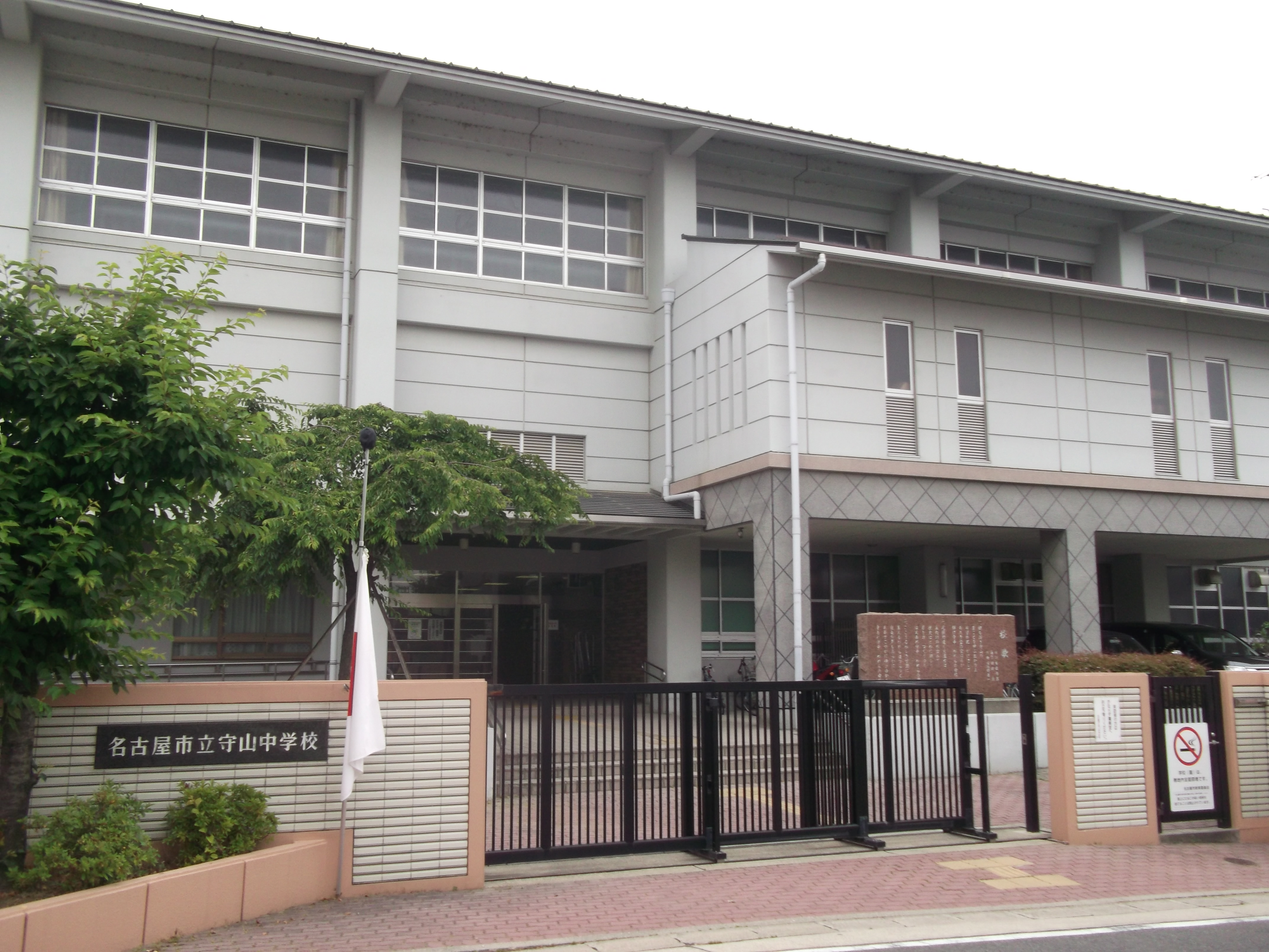 名古屋市守山区大屋敷の名古屋市立守山中学校を東側公道から写す